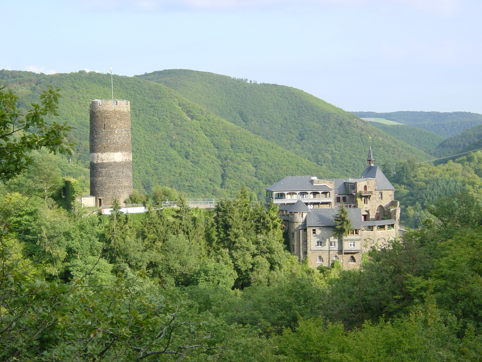 Blick auf Burg Bischofstein vom "Milchweg" aus.